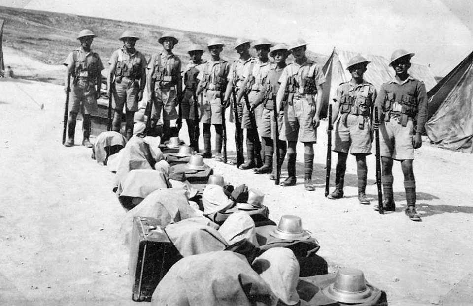 מסדר